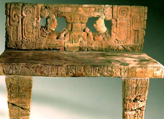 Trono 1 de Piedras Negras en el Museo Nacional de Antrpologia e Historia de Guatemala, 2004